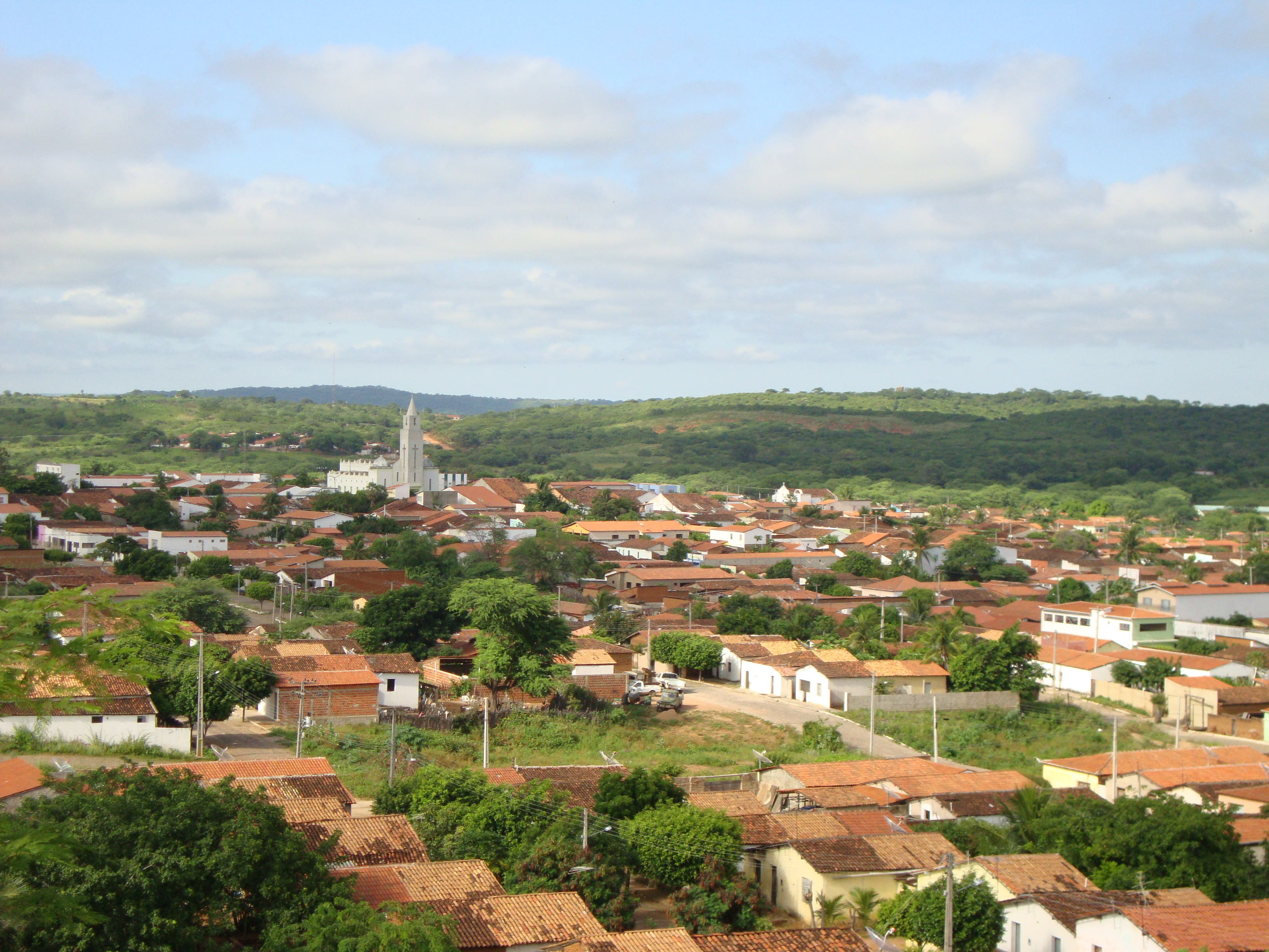 Vista Parcial de Pio IX